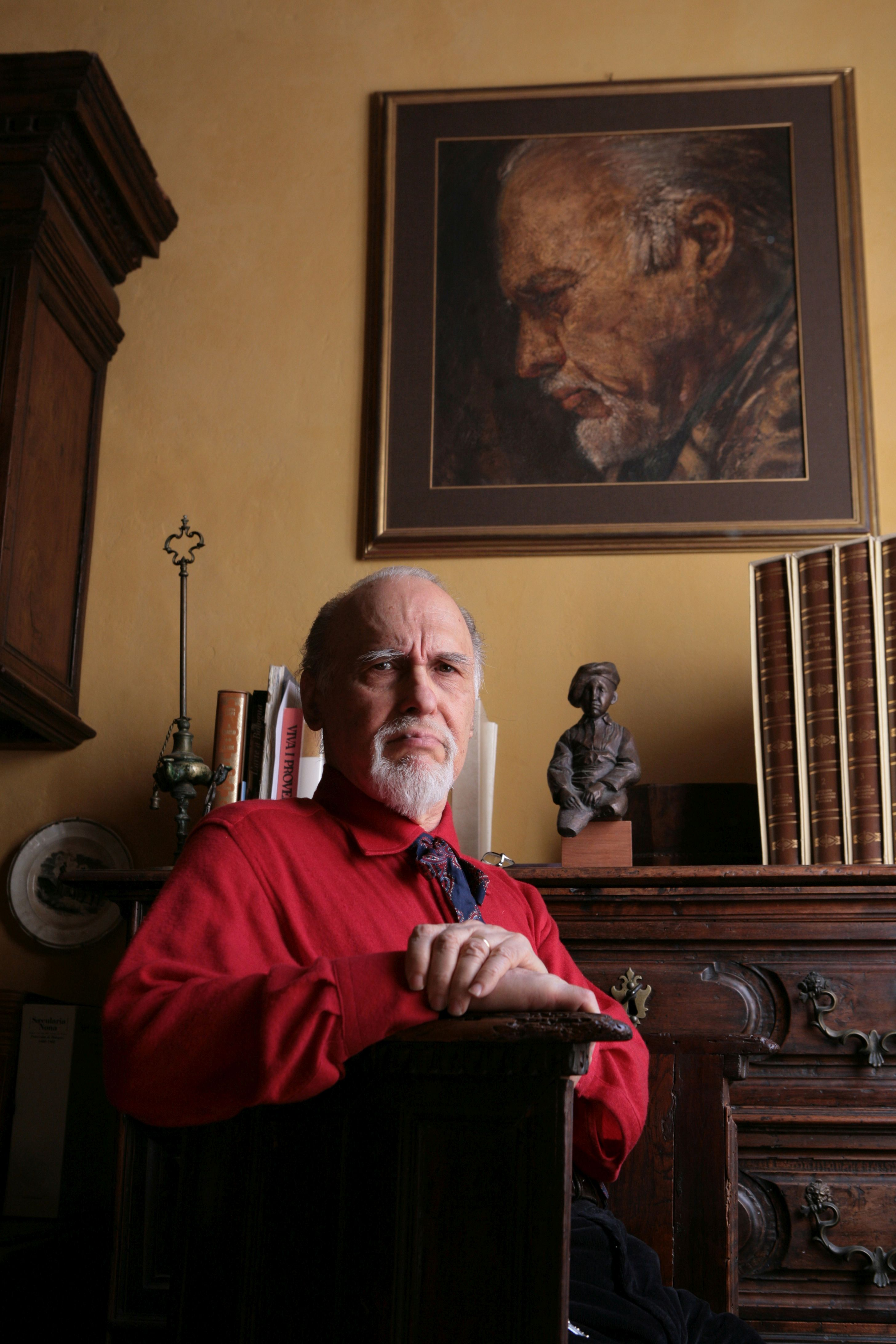 Ritratto di Wolfango Peretti Poggi nella sua abitazione